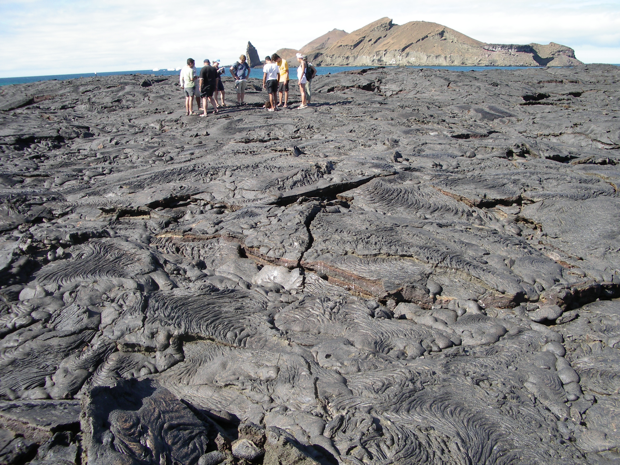 Lava field (Pahoehoe lava) at Sullivan Bay, Isla de Santiago, Galapagos Islands